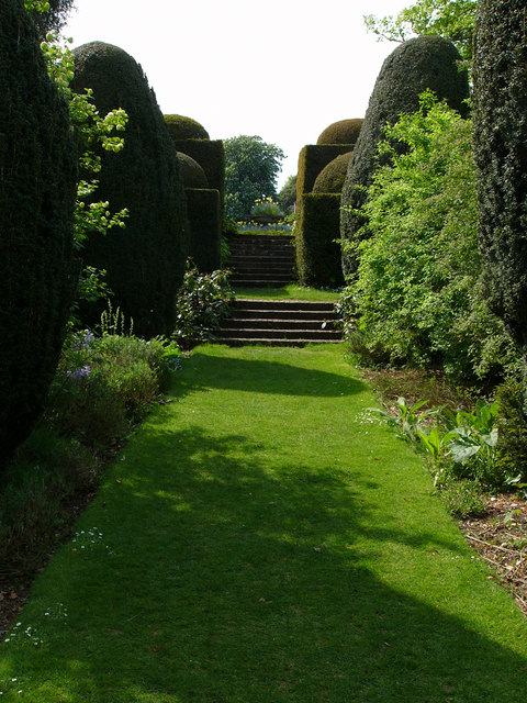 Garden, Hinton Ampner House